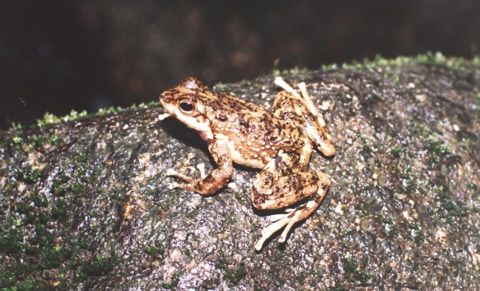 Hylodes asper